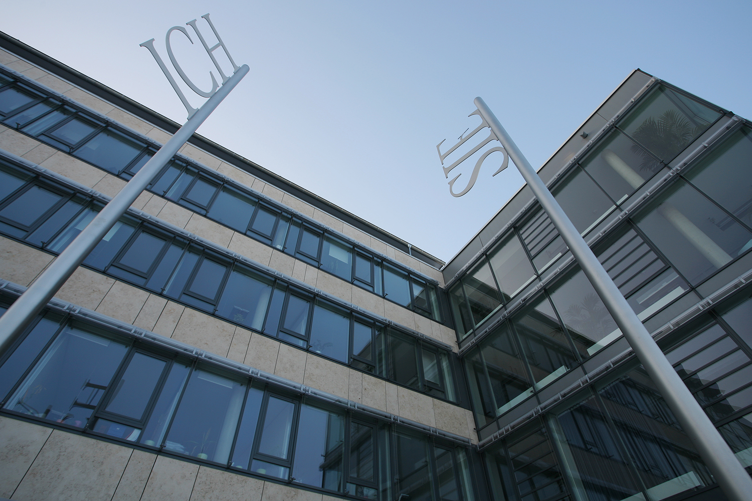 Landratsamt Rastatt (Neubau)